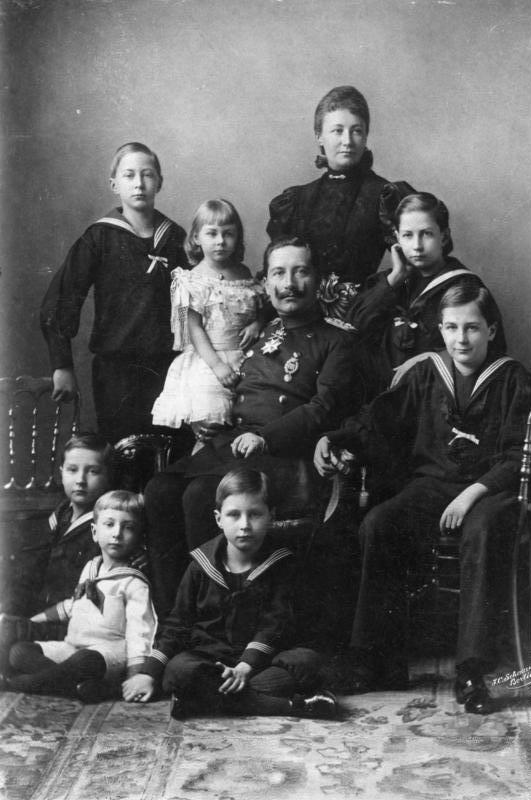 N.d. Original-Aufnahme d. kgl. Hofphotogr[aphen] J. C. Schaarwächter, Berlin 1896 Gruppenbild der Kaiserlichen Familie. Kronprinz Friedrich Wilhelm *6.5.1882 Kaiserin Augusta Victoria *22.10.1858 Prinzessin Victoria *18.9.1892 Prinz Adalbert *14.7.1884 Prinz August Wilhelm *29.1.1887 Kaiser Wilhelm *27.1.1859 Prinz Eitel Friedrich *7.7.1883 Prinz Joachim *17.12.1890 Prinz Oscar *27.7.1888 Verlag Neue Photographische Gesellschaft, Berlin-Steglitz 1898